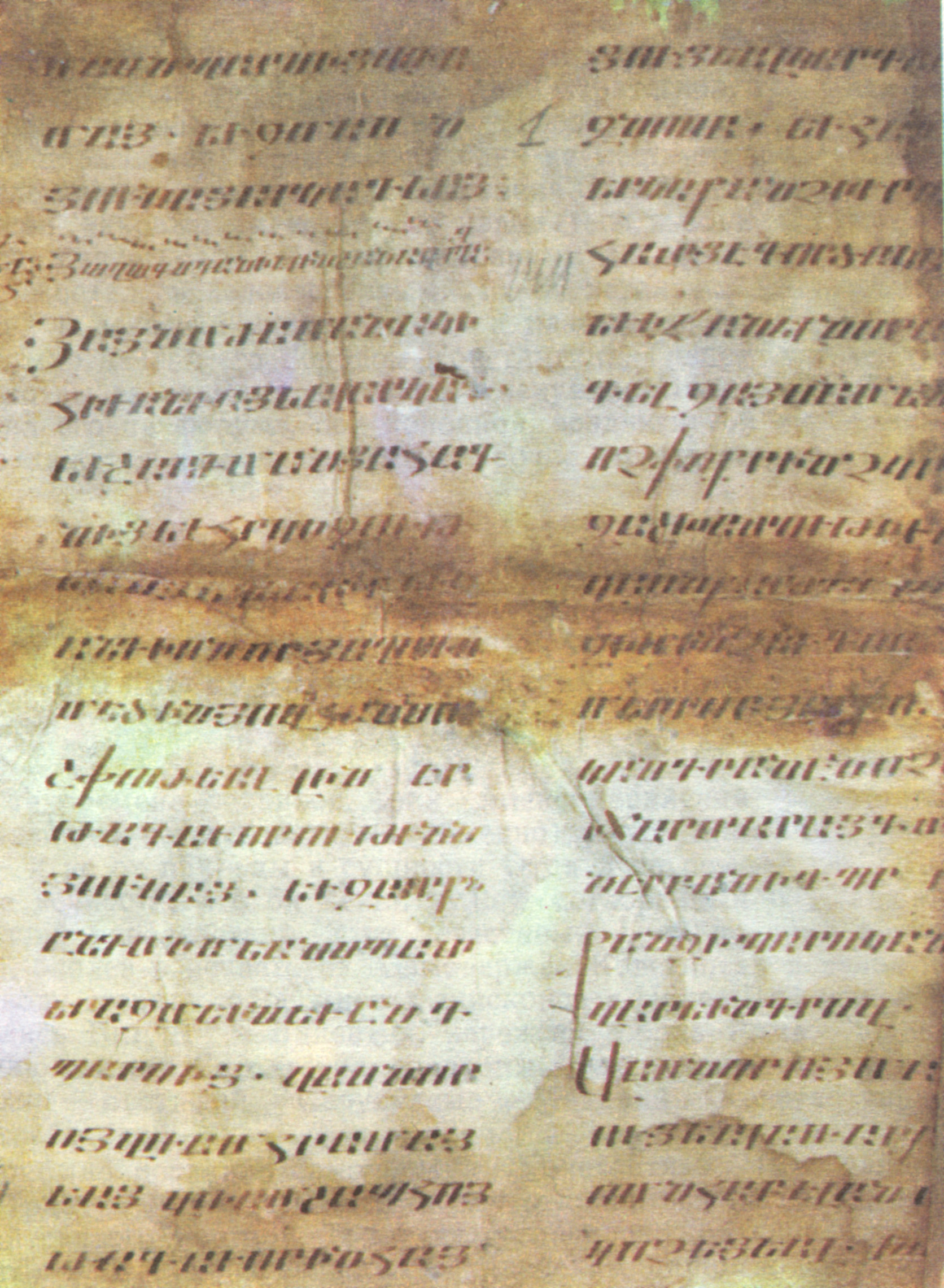 Histoire de l'Arménie, Moïse de Khorène, patarik 1411, Matenadaran, Erevan, Arménie. X-XI s.